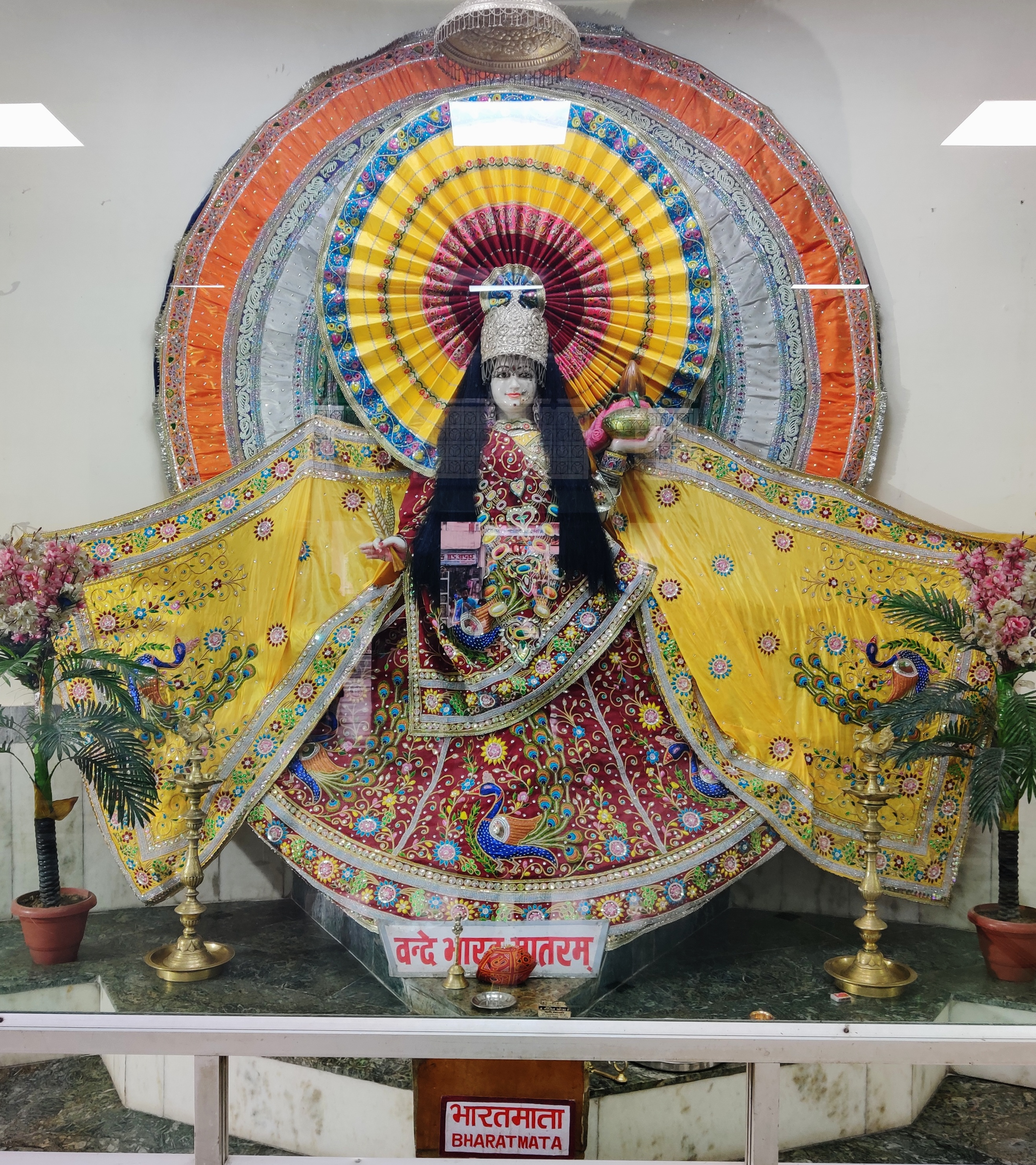 भारत माता मंदिर, हरिद्वार में स्थित भारत माता की प्रतिमा।